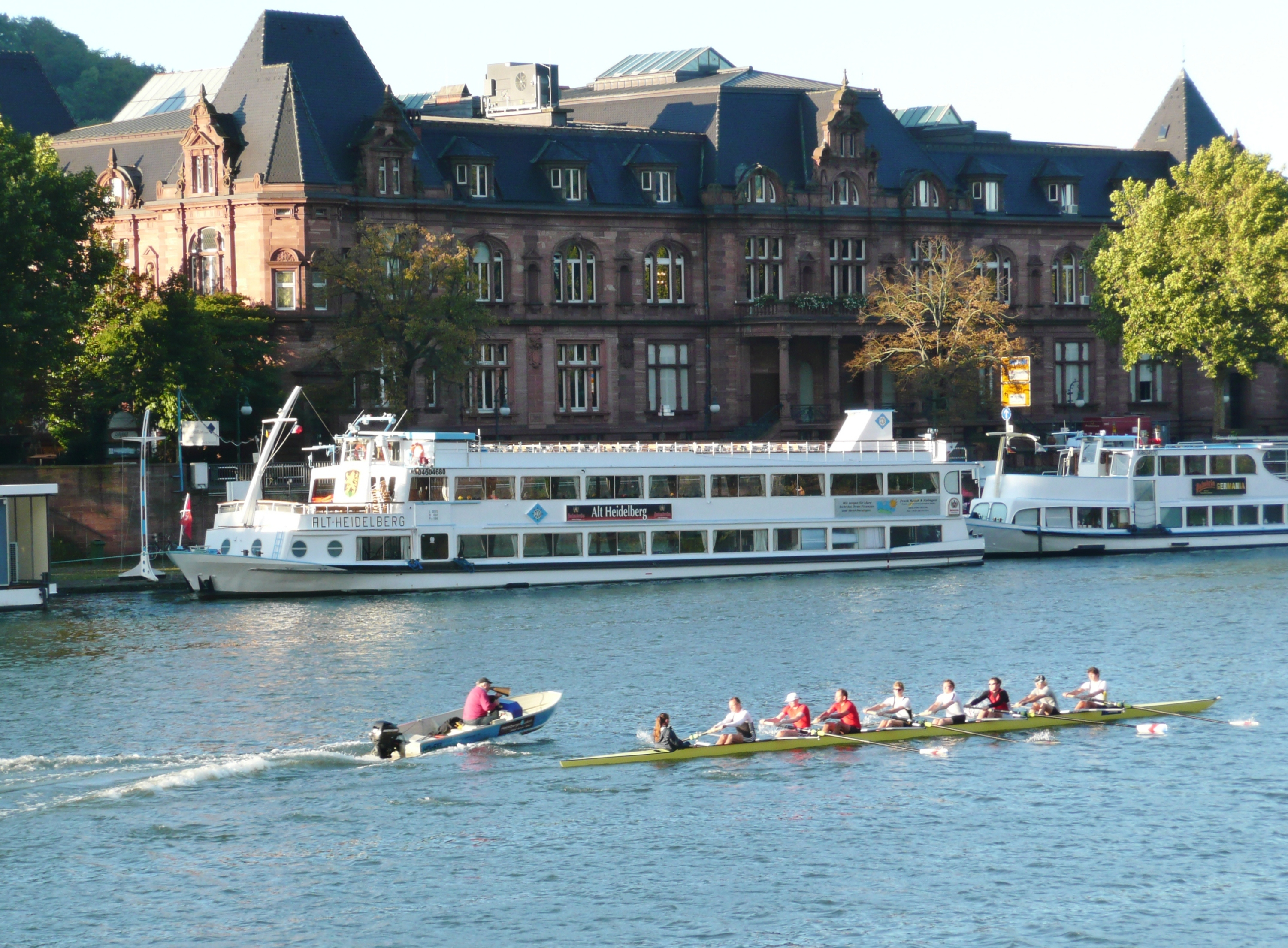 Ausblick vom 366 km langen Neckartalradweg: Neckar in Heidelberg